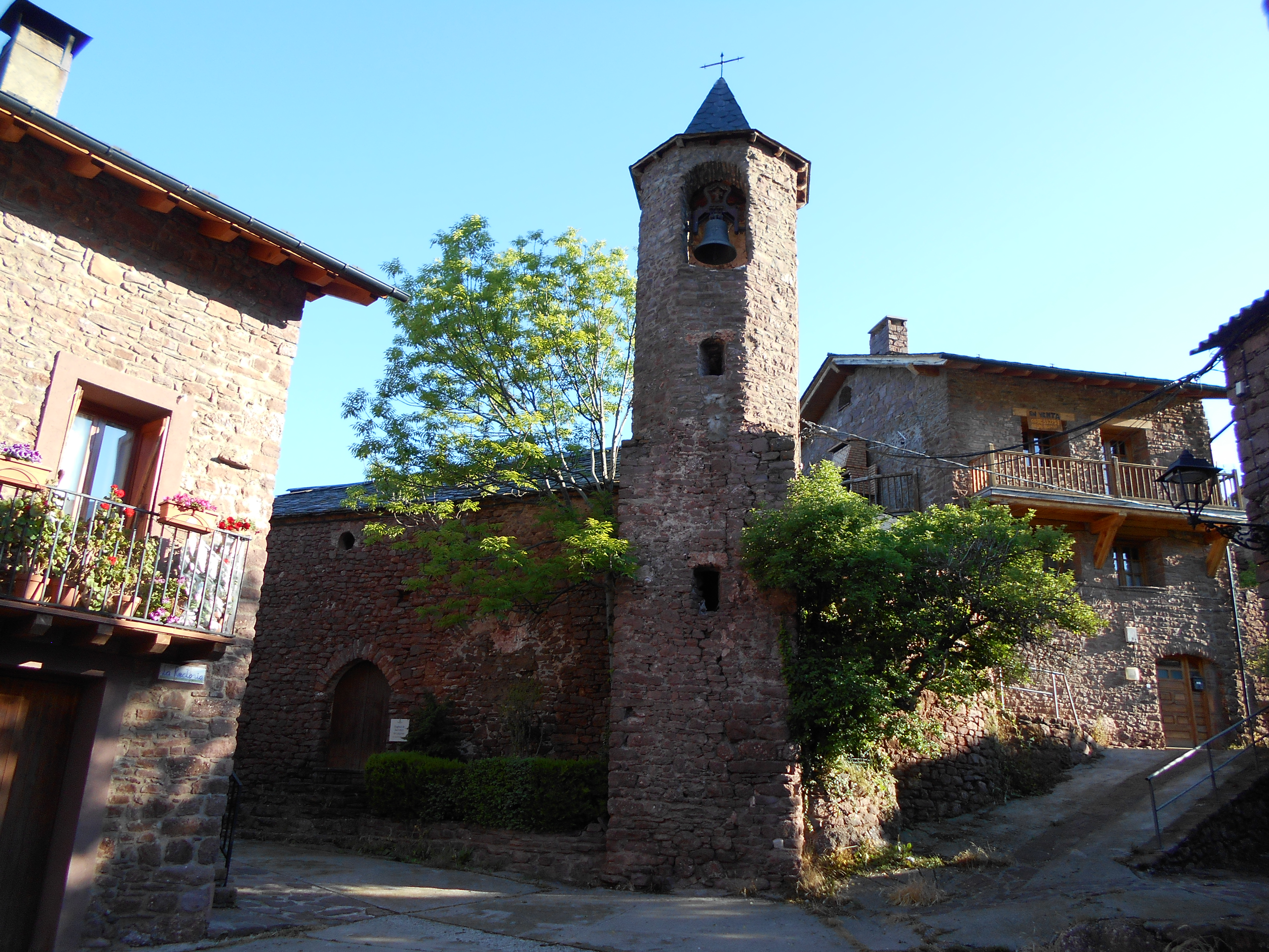 Església parroquial de Llagunes i placeta (antic cementiri).